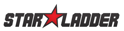 Logo von Star Ladder